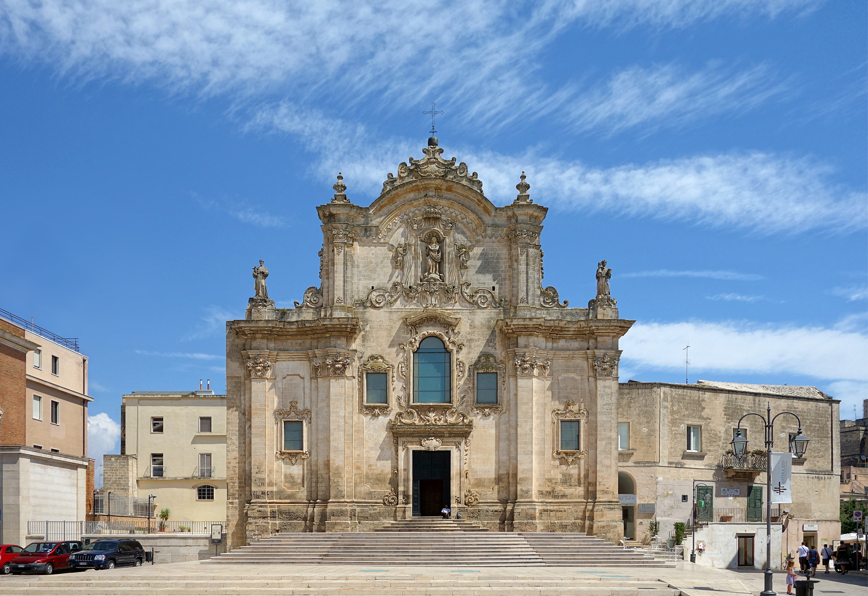 L'église San Francesco d'Assisi de Matera.